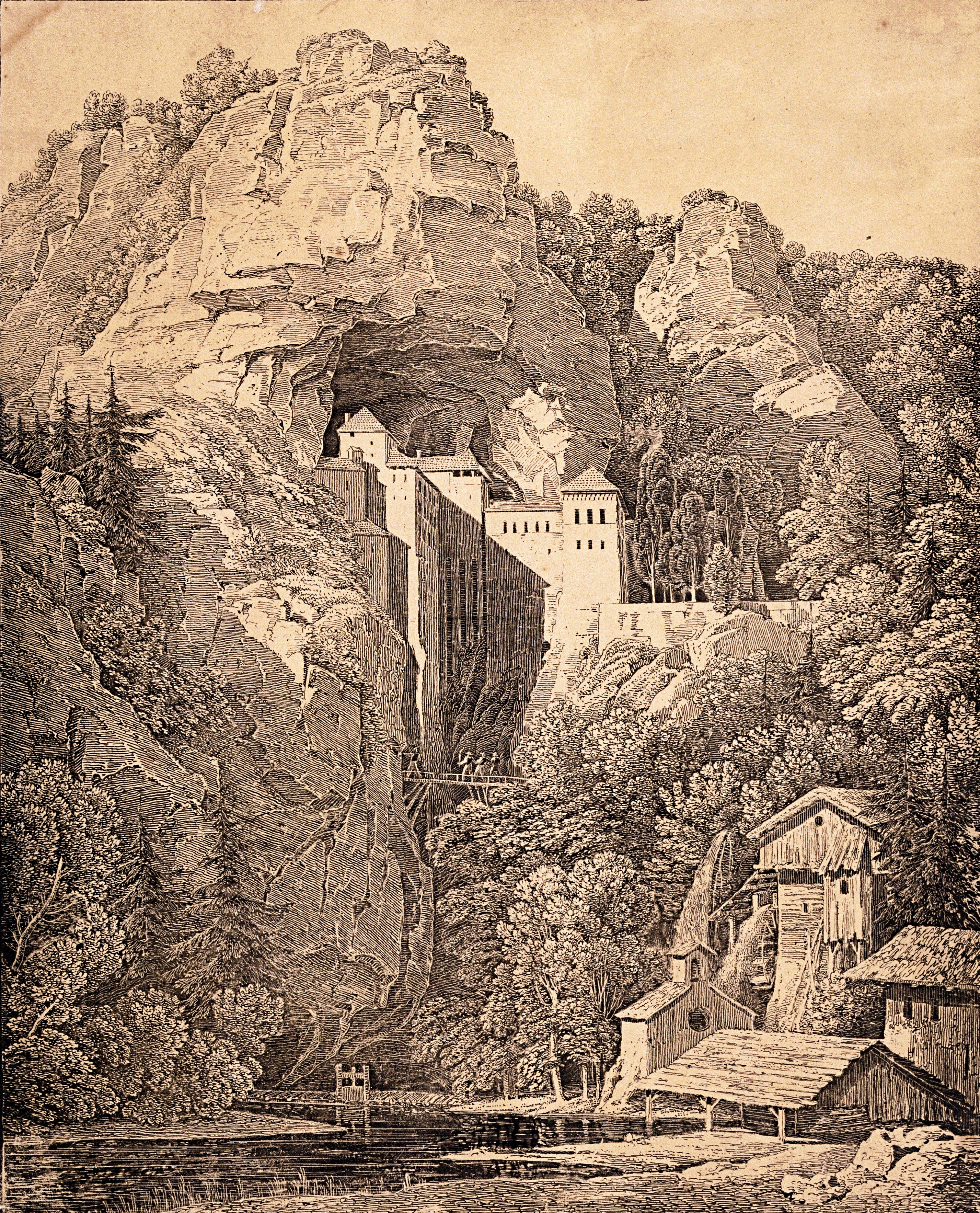 Das Schloss Prediama in Crein XII Stund.